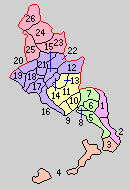 山口県熊毛郡の町村制時点の町村。